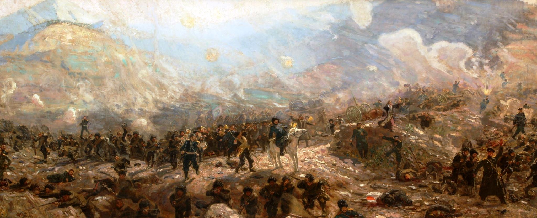 11-й Восточно-Сибирский стрелковый полк в Тюренченском бою, 1904 год.